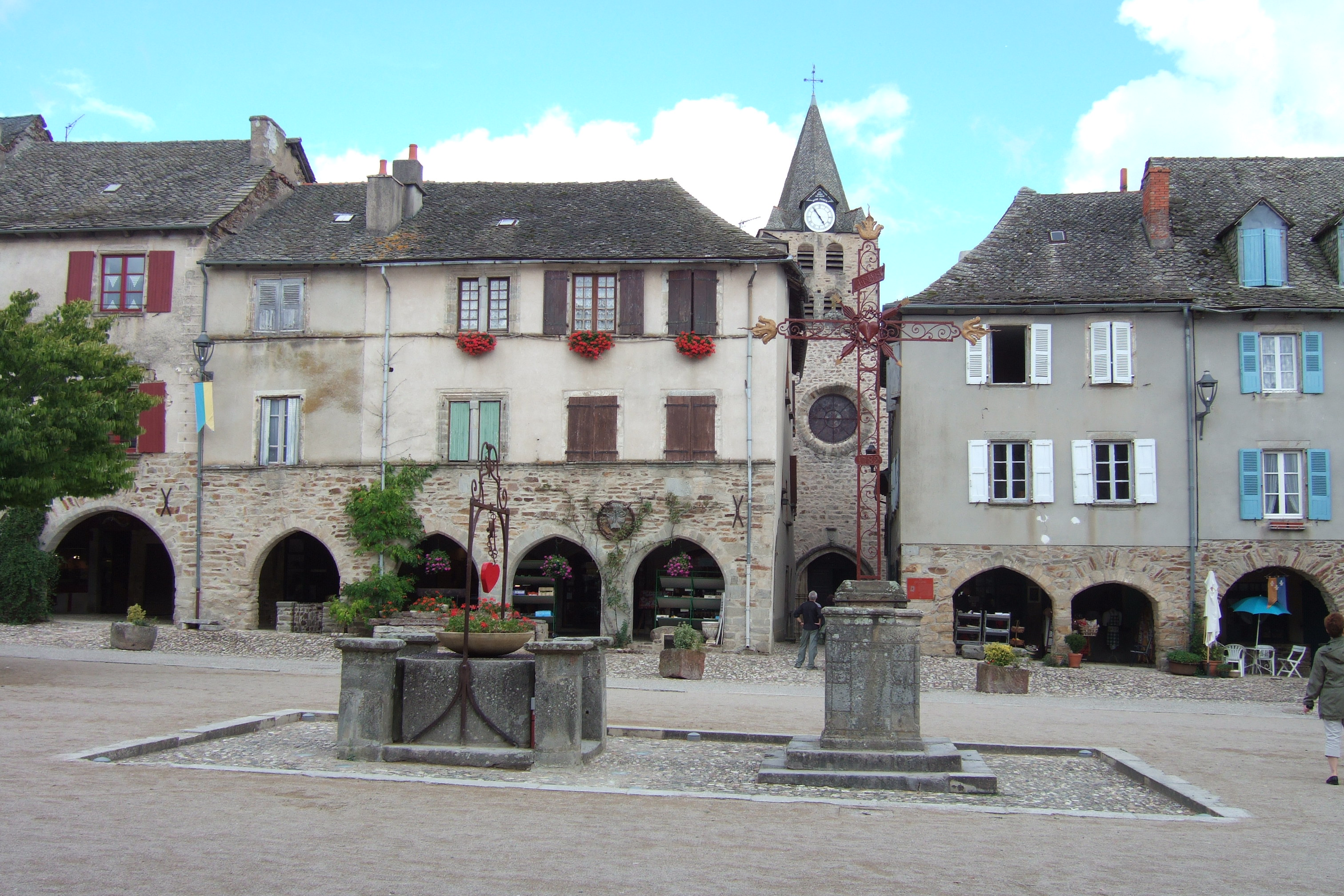 Vue partielle du côté est de la place de Sauveterre-de-Rouergue, avec croix et clocher.